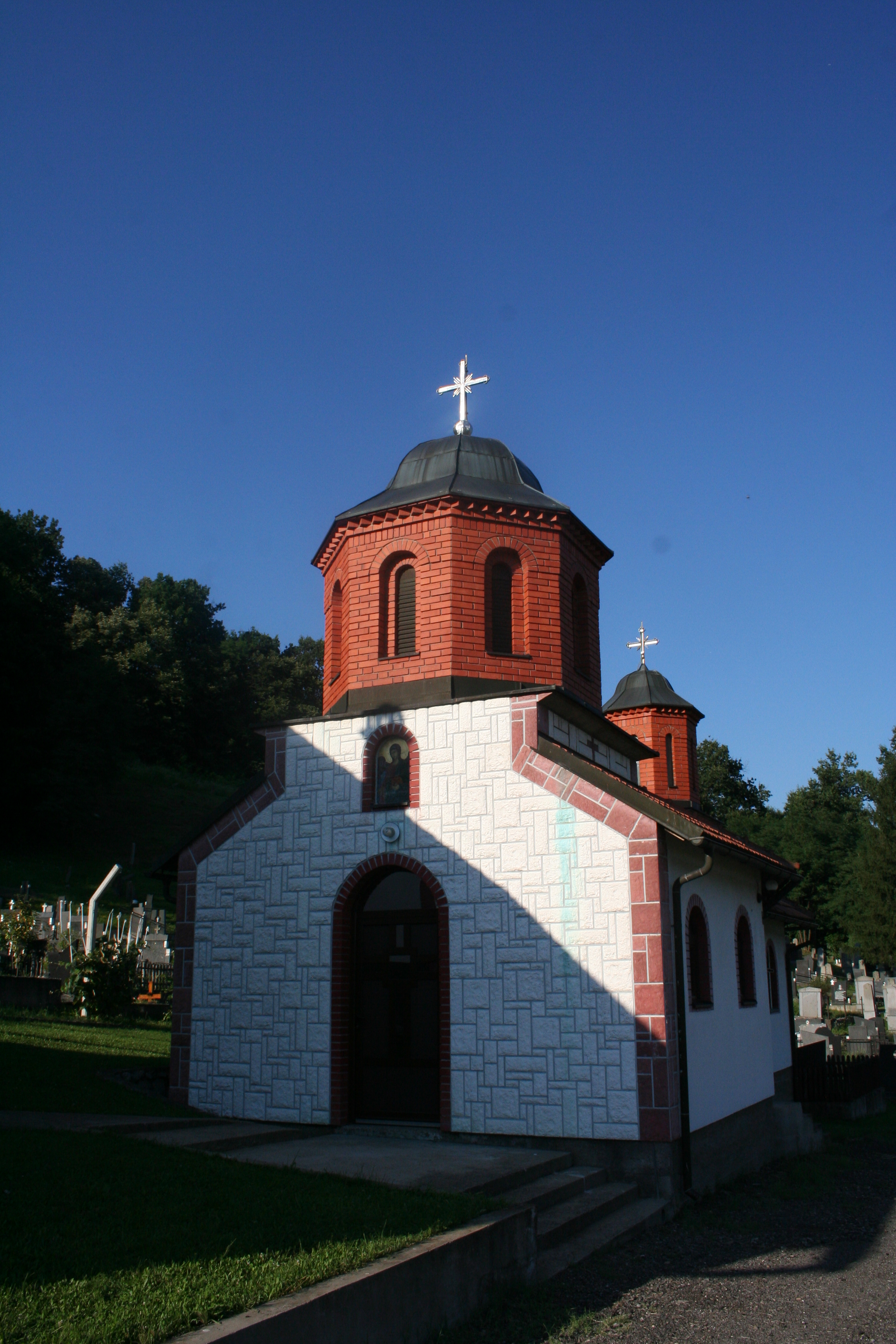 Crkva Sv. Arhangela Gavrila, Stupnica